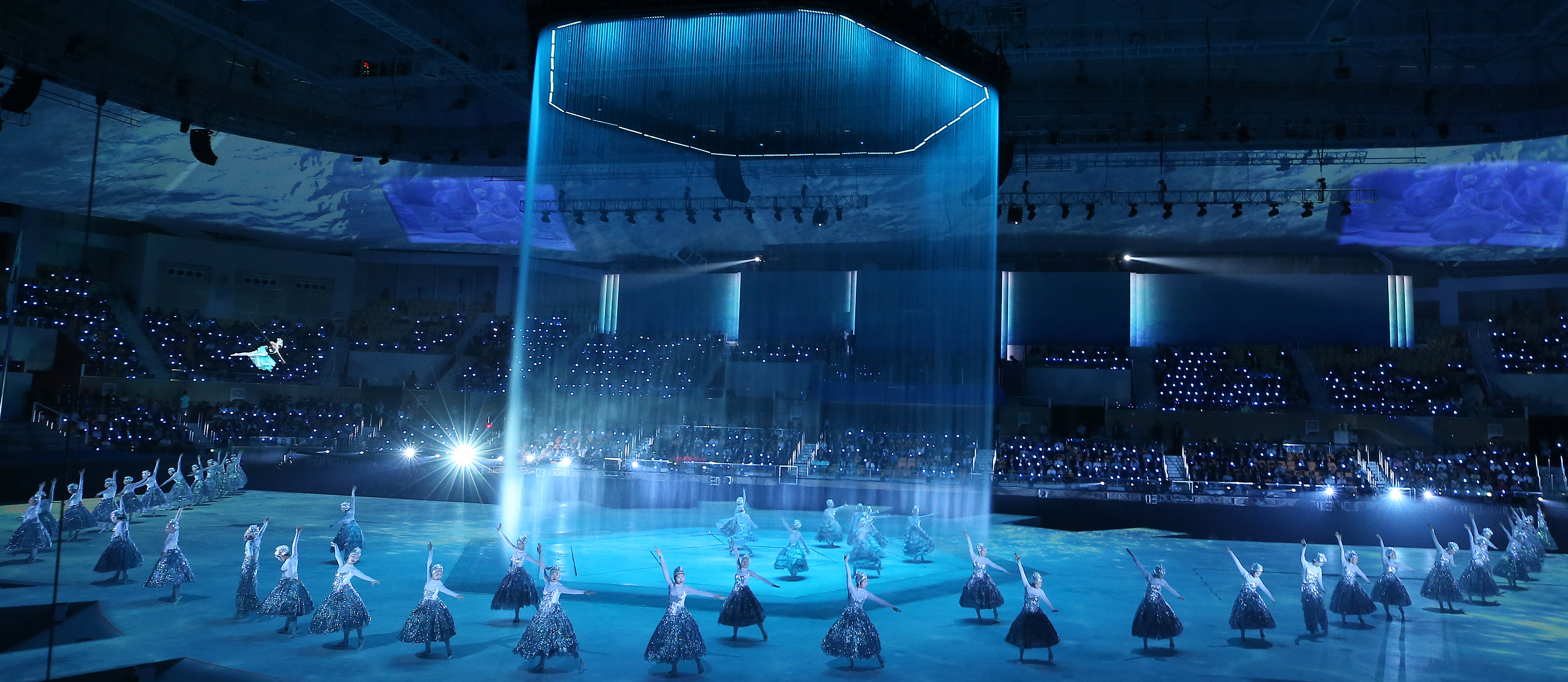 The Opening Ceremony for The 18th FINA World Championships Gwangju 2019 July 12, 2019 Gwangju-si Ministry of Culture, Sports and Tourism Official Photographer : Jeon So-hyang This official Republic of Korea photograph is being made available only for publication by news organizations and/or for personal printing by the subject(s) of the photograph. The photograph may not be manipulated in any way. Also, it may not be used in any type of commercial, advertisement, product or promotion that in any way suggests approval or endorsement from the government of the Republic of Korea. 제18회 2019 광주 FINA 세계수영선수권대회 개막식 2019-07-12 광주여자대학교 유니버시아드 체육관 문화체육관광부 전소향